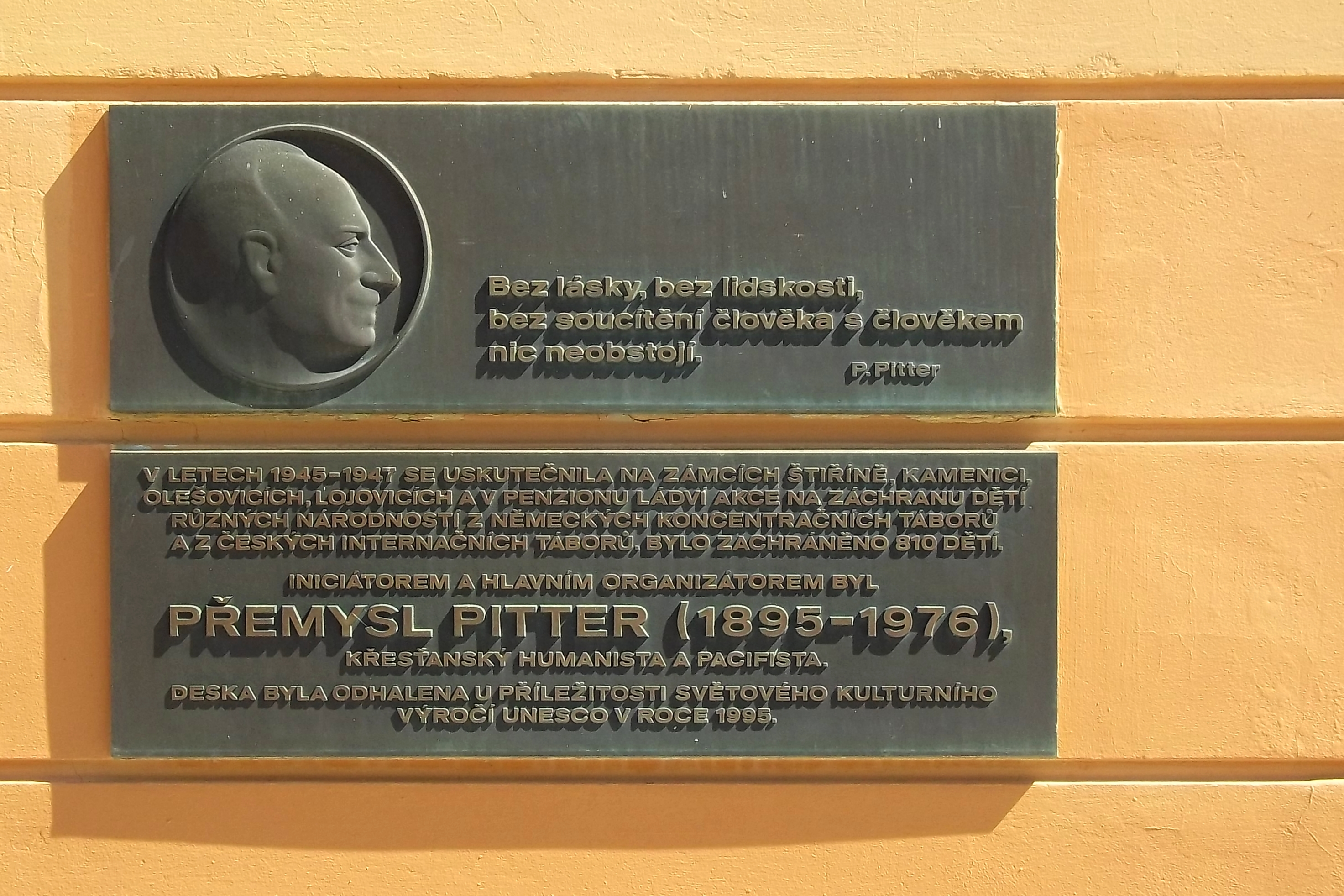 Pamětní deska na zámku Štiřín (ČR). Foto Mr.JaroCZ